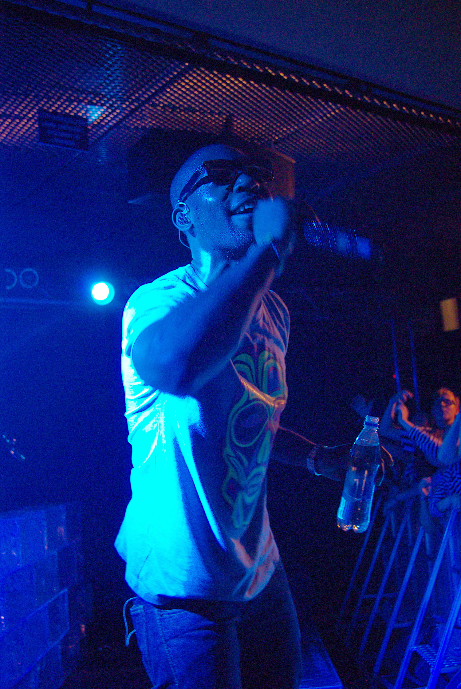 Tine Tempah